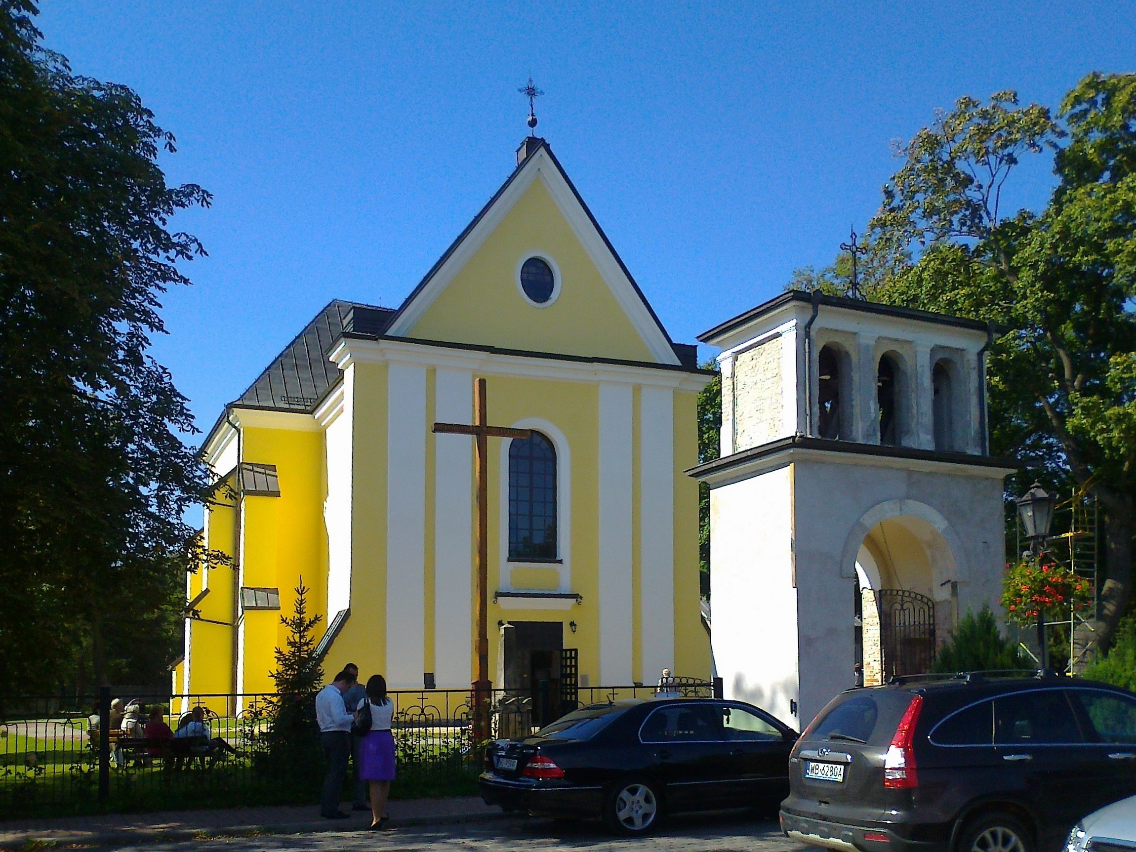 Nieporęt - kościół p.w. Niepokalanego Poczęcia NMP (zabytek nr 1066/673/62)